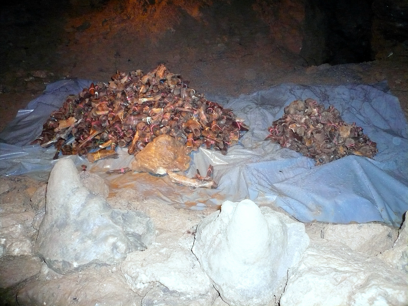 Heinrichshöhle